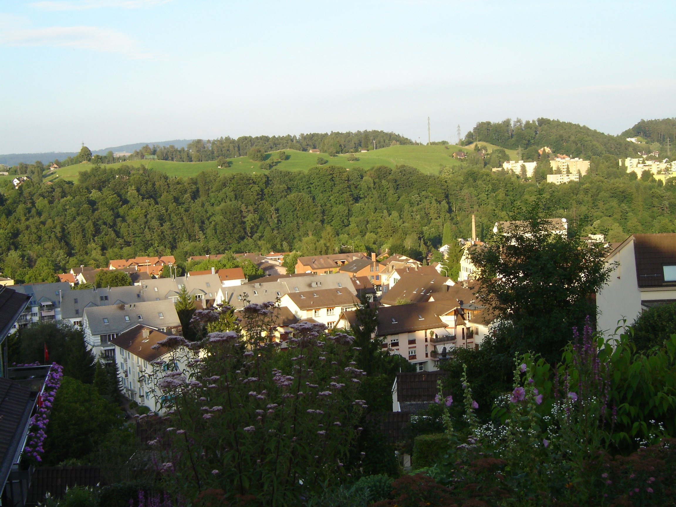 Langnau am Albis, selbst fotografiert